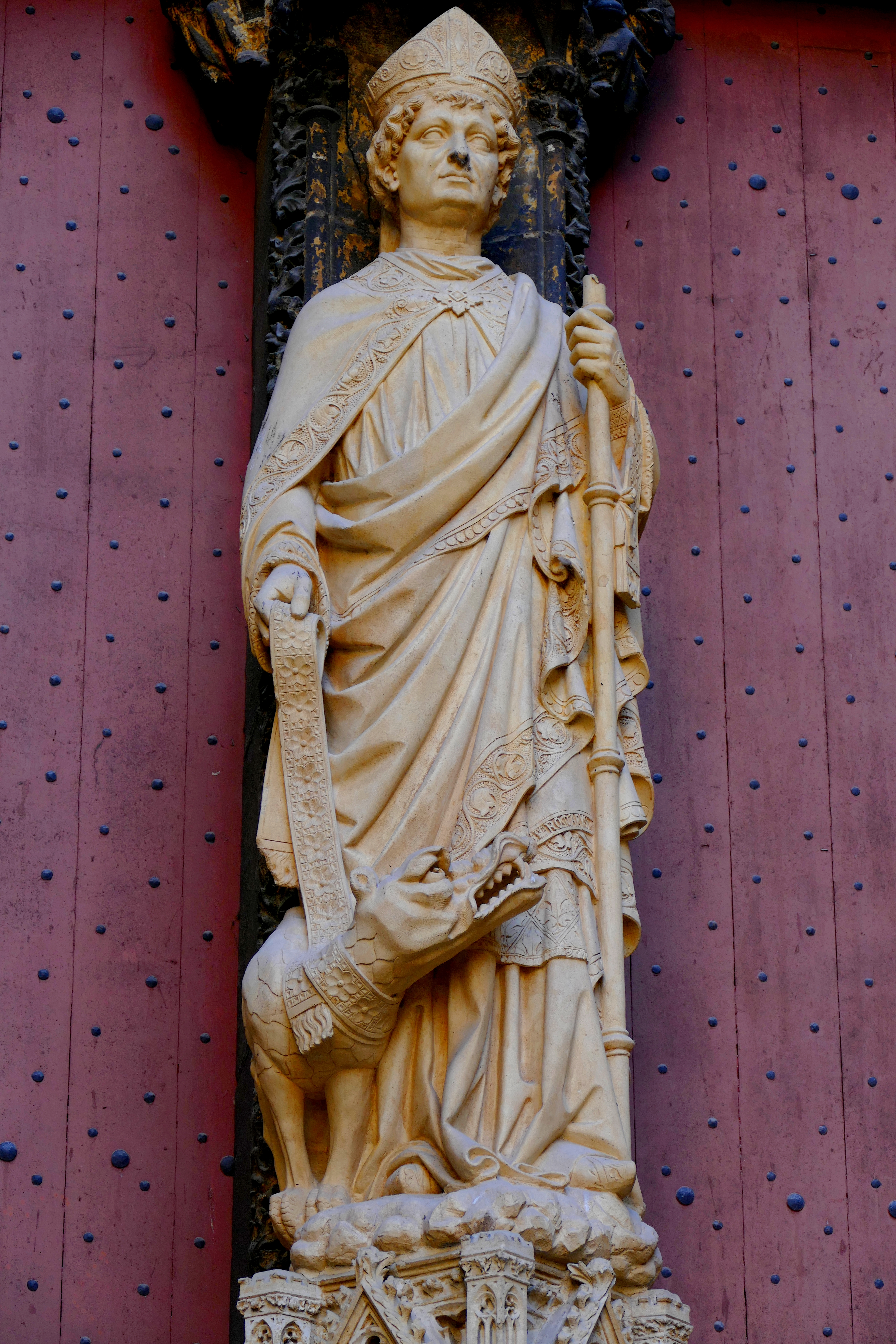 Statue de Saint-Romain, Trumeau du portail des Libraires, Notre-Dame de Rouen (Seine-Maritime).